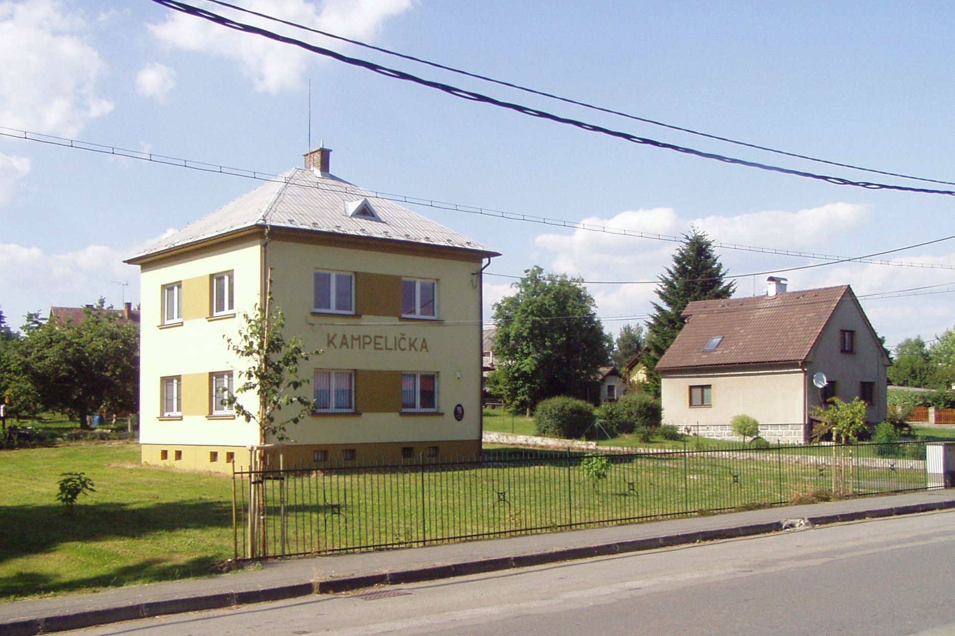 Obecní úřad, Svijany